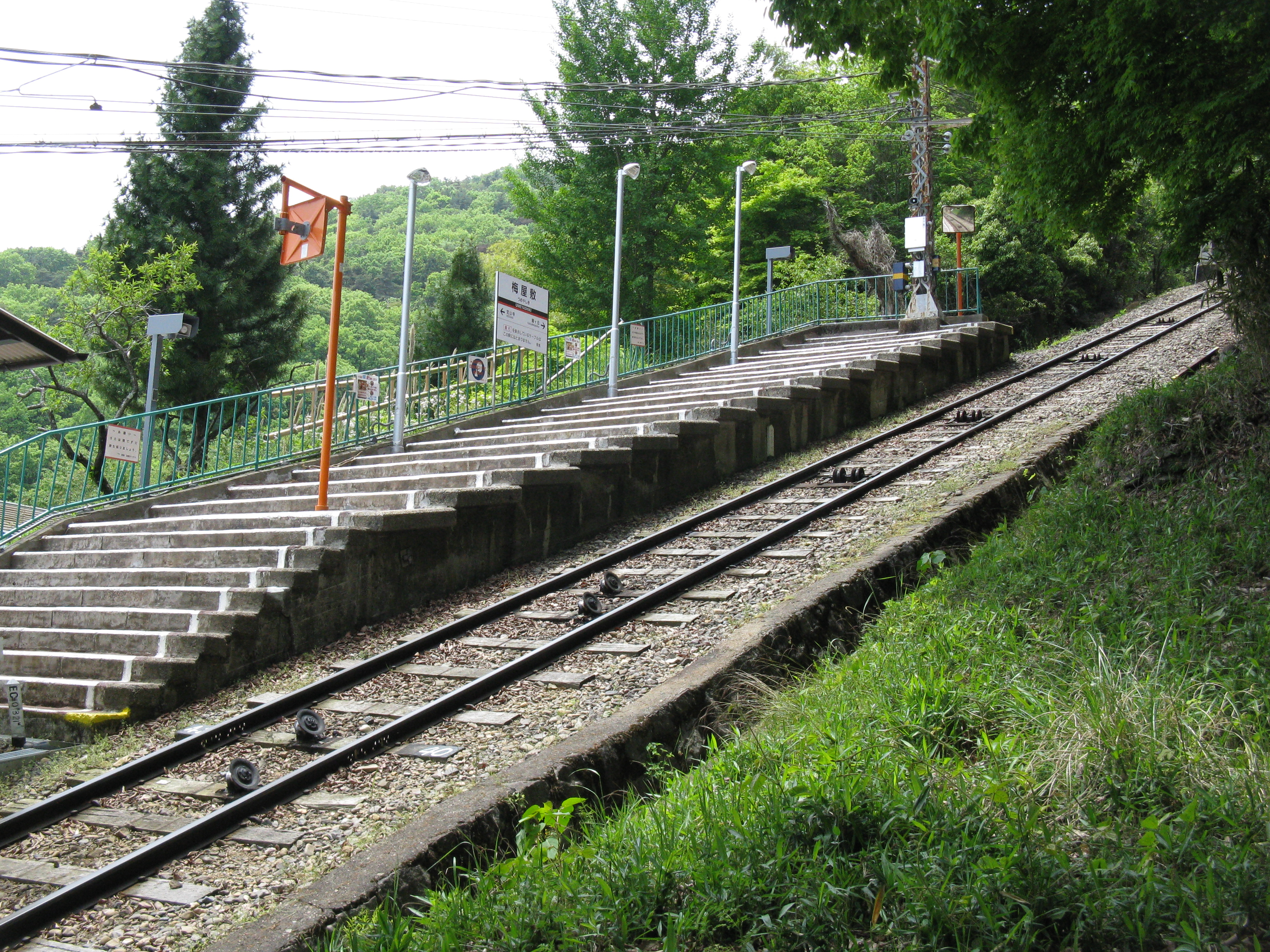 梅屋敷駅 (奈良県)